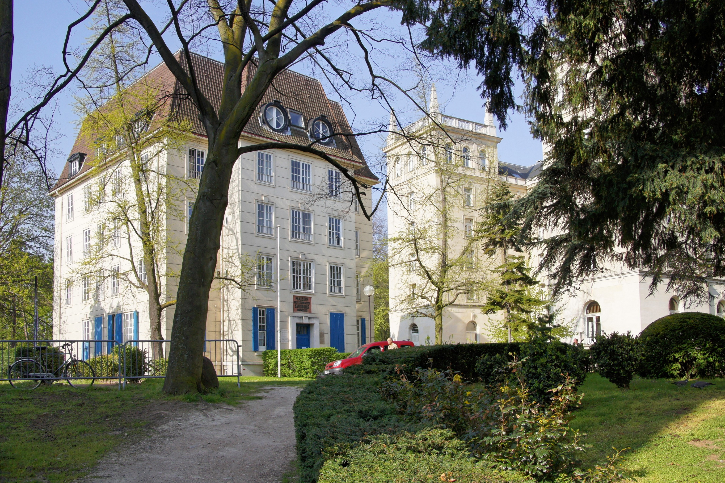 Maison de Suède dans l'enceinte de la Cité Universitaire.